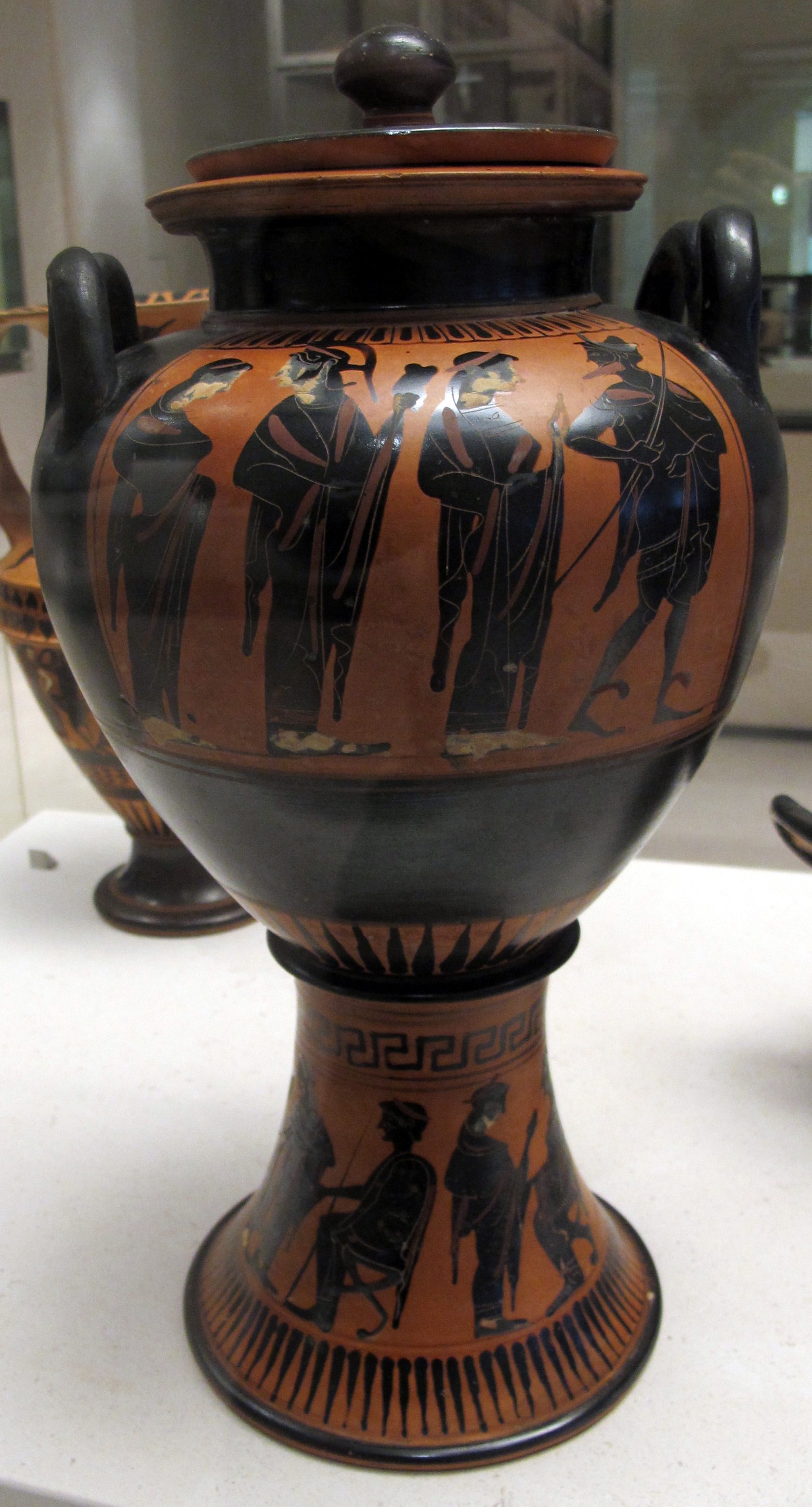 Arte greca, Petit Palais, Parigi